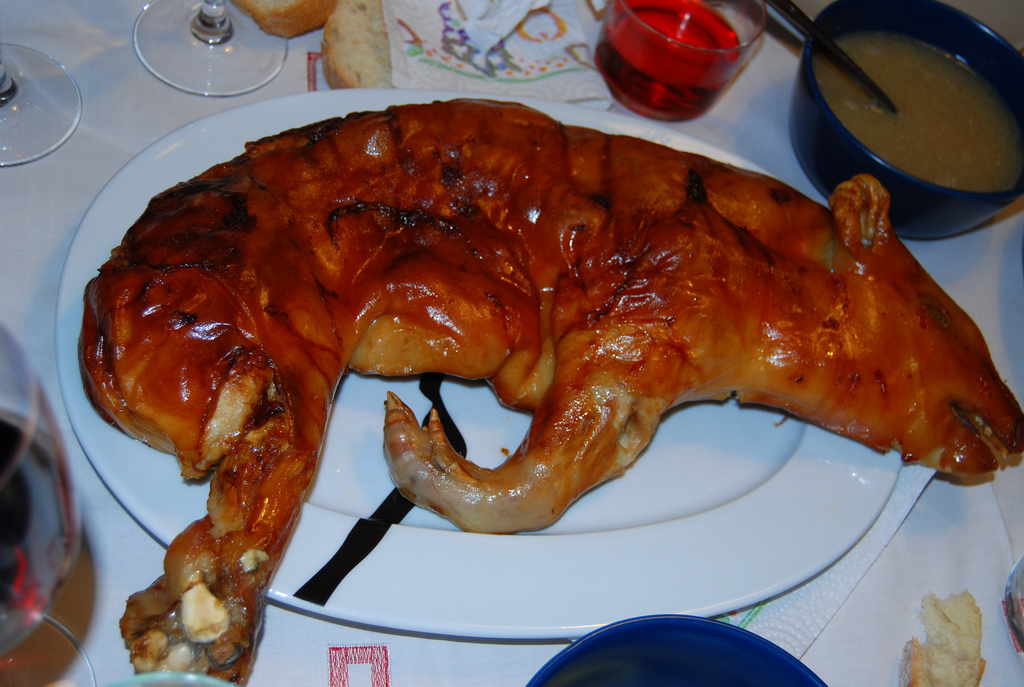 Leitão de Segóvia, um prato espanhol.